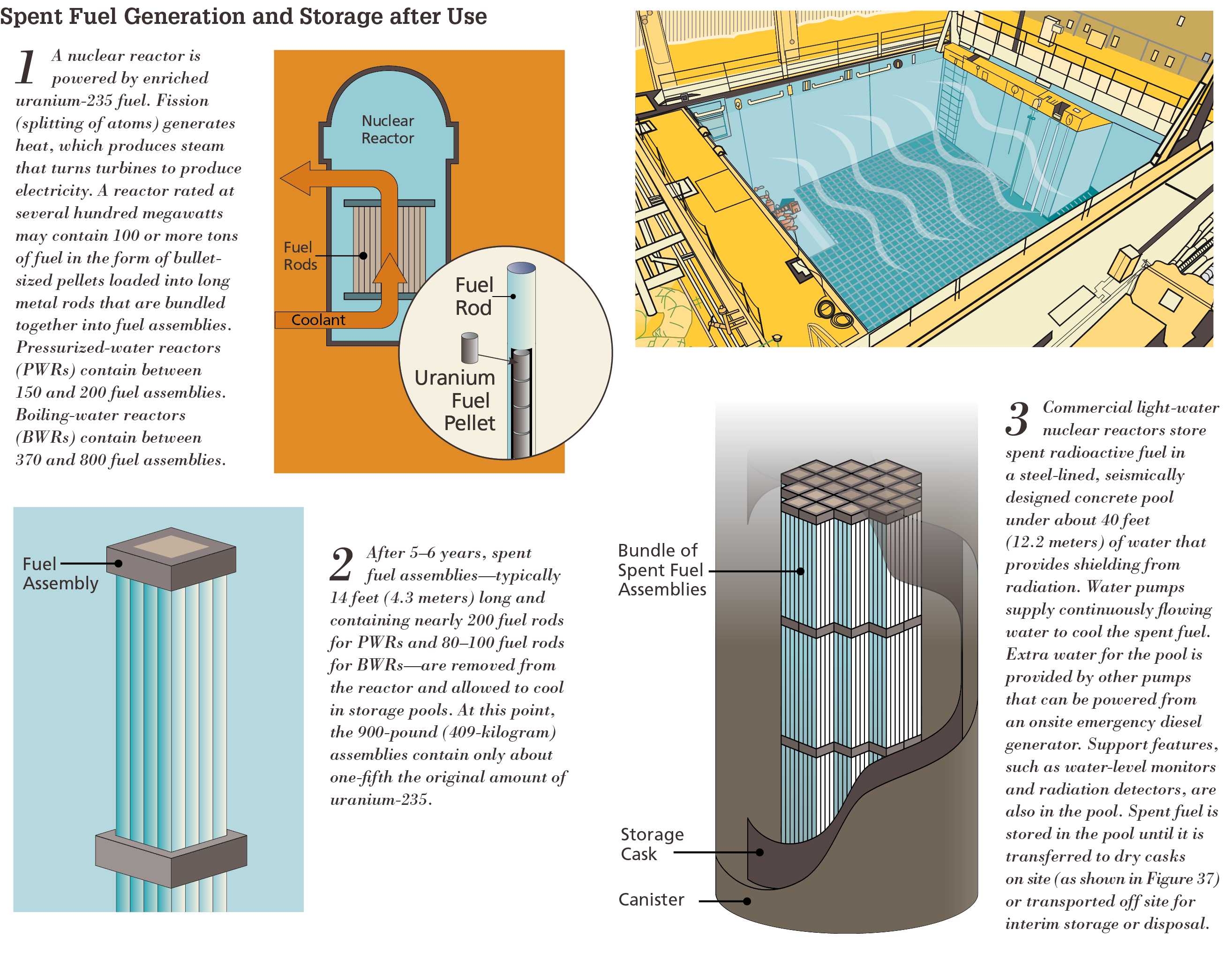 Spent Fuel_Storage